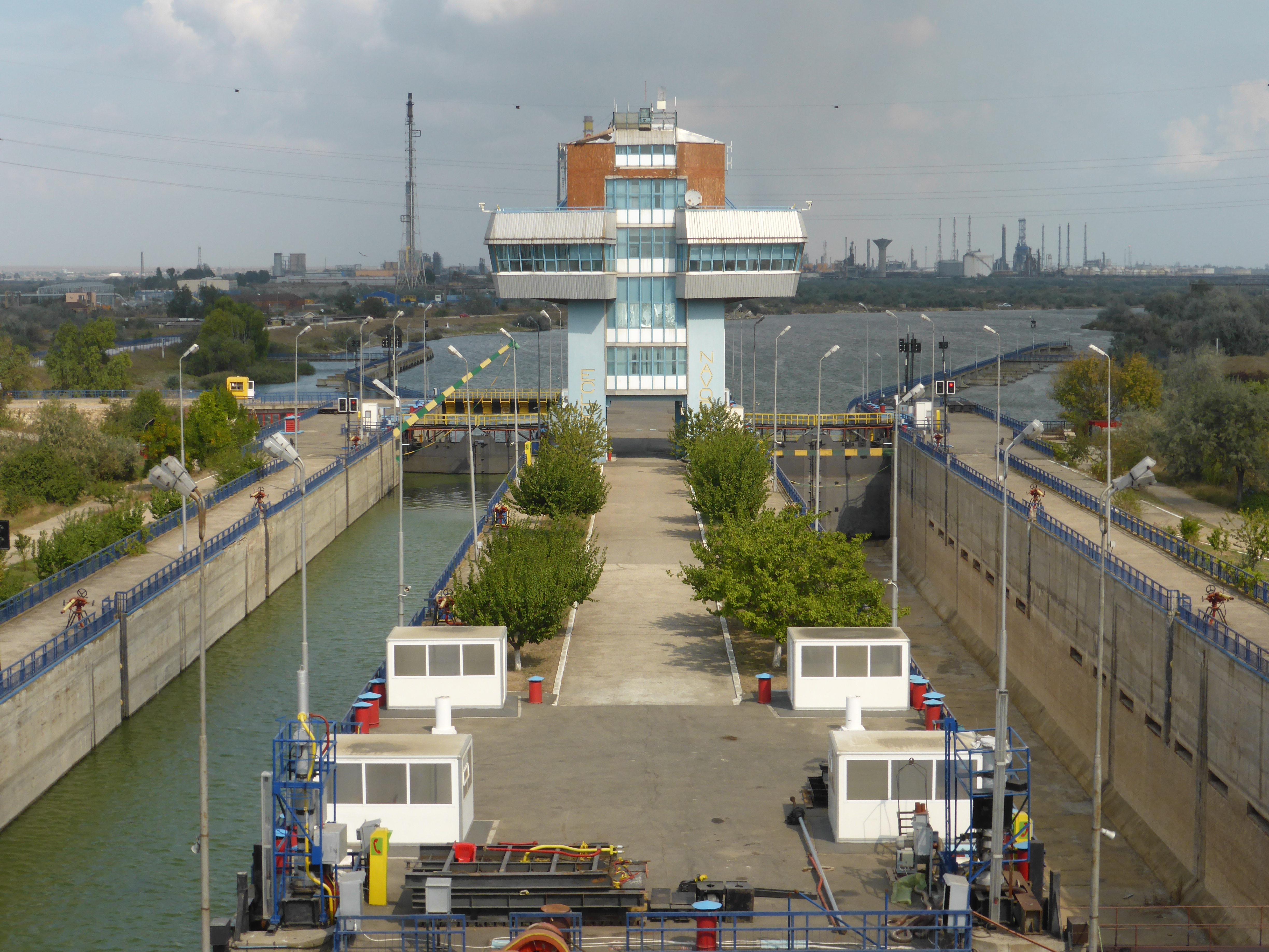 Die Schleuse Năvodari im Donau-Schwarzmeer-Kanal.